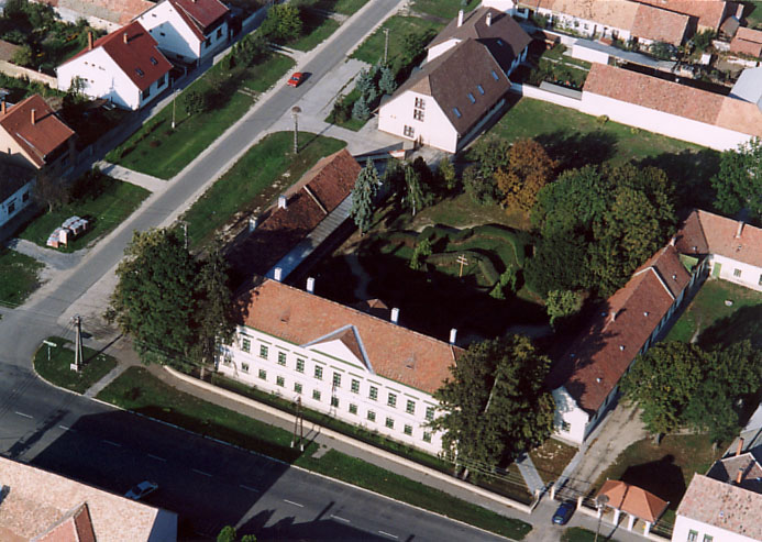 Palace - Szany - Hungary - Europe